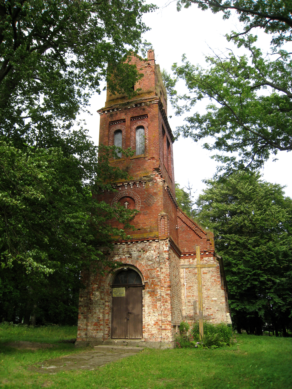 Die Kirche von Komorowo (Polanów) (dt. Kummerow). Kummerow kam unter dem Namen Komorowo unter polnische Hoheit und ist heute ein Teil der Stadt- und Landgemeinde Polanów im Powiat Koszaliński der Woiwodschaft Westpommern (bis 1998 Woiwodschaft Köslin). Gründungsjahr: unbekannt.